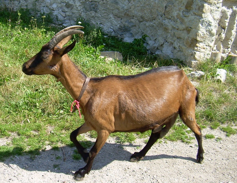 Házikecske (Capra aegagrus hircus)